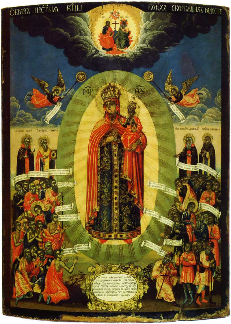 Икона богородицы "Всех скорбящих Радость". Our lady of all sorrowfull. Школа или худ. центр: Москва Центральный музей древнерусского искусства им. Андрея Рублева, Москва, Россия Точный мерный список с чудотворной иконы из Скорбященской ц. на Ордынке.